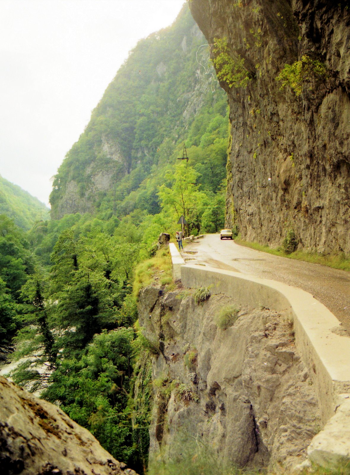 Sochi - Soczi - wąwóz "Ahzu' 33km drogi do Krasnej Polany 1992